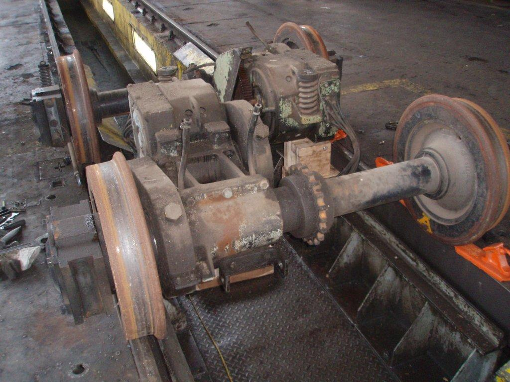 Fahrwerk einer EL16